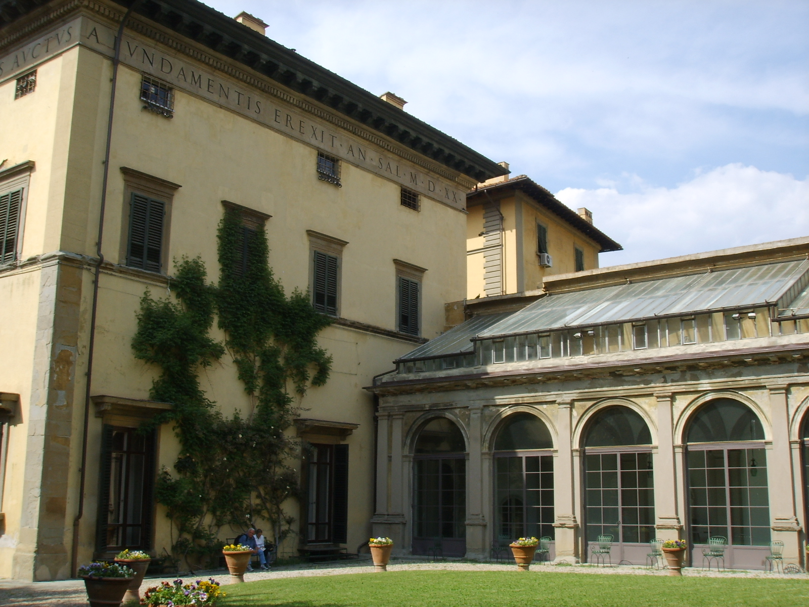 Paalzzo pandolfini, prospetto giardino